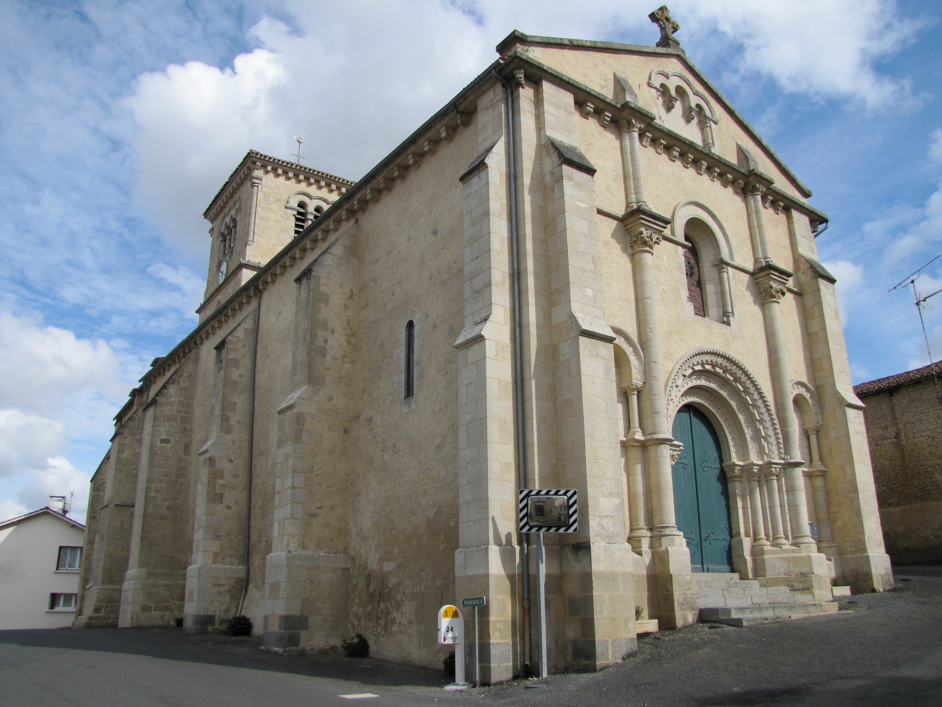 Église de La Caillère-Saint-Hilaire